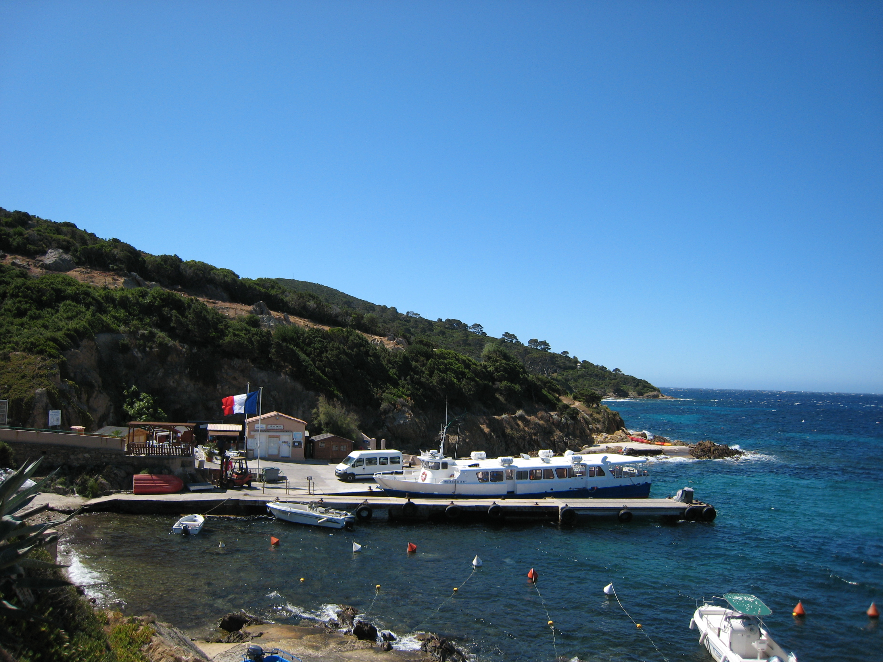 Port of Levant island: Ayguade du Levant.